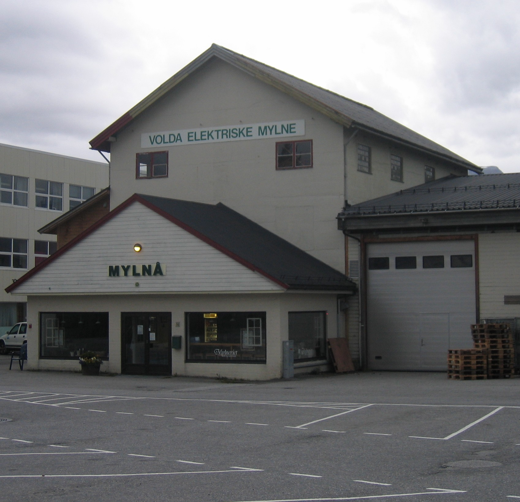 Volda elektriske mylne, Volda, Sunnmøre